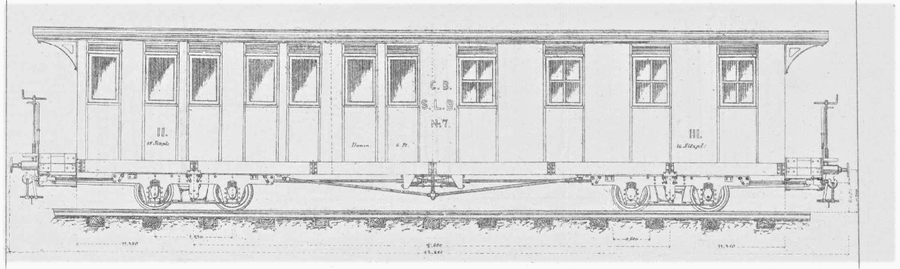 Typenskizze des Personenwagen Nr. 7 der Schweizerischen Local-Bahnen. Der meterspurige Wagen 2. und 3. Klasse wurde auf der mehrspurigen Strecke Winkeln—Appenzell eingesetzt